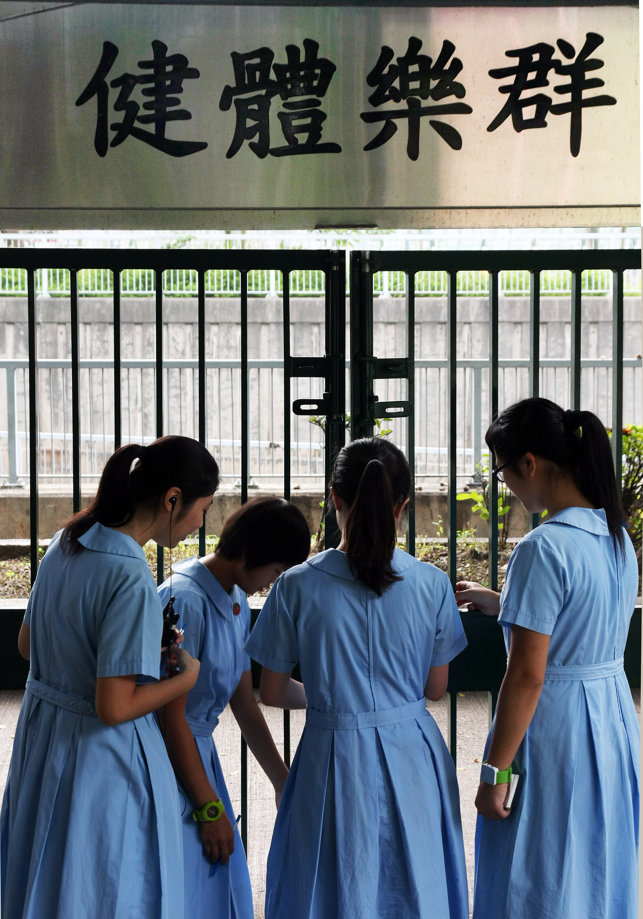 學校後門,相中正有領袖生